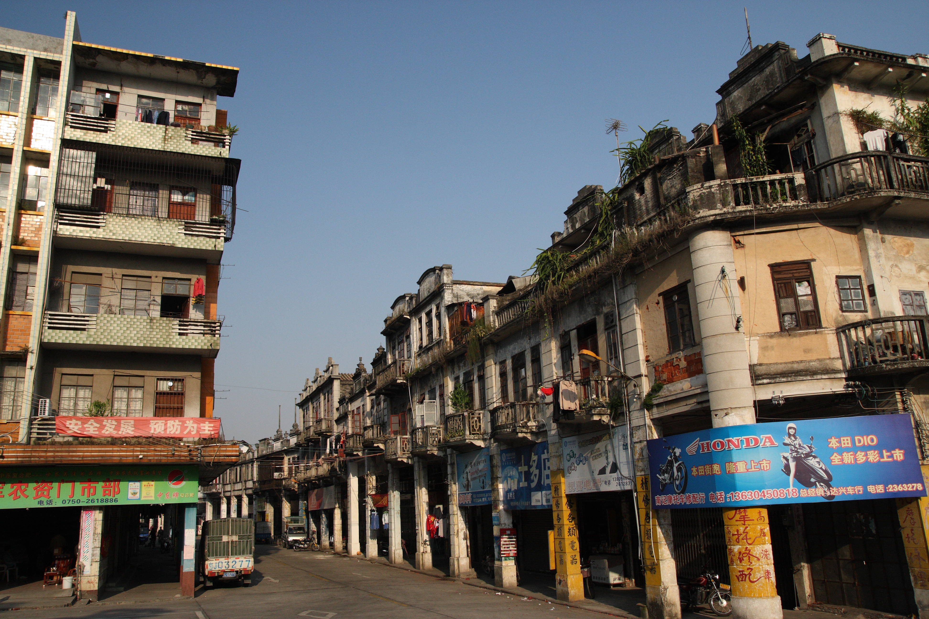 Chikan, Kaiping, China